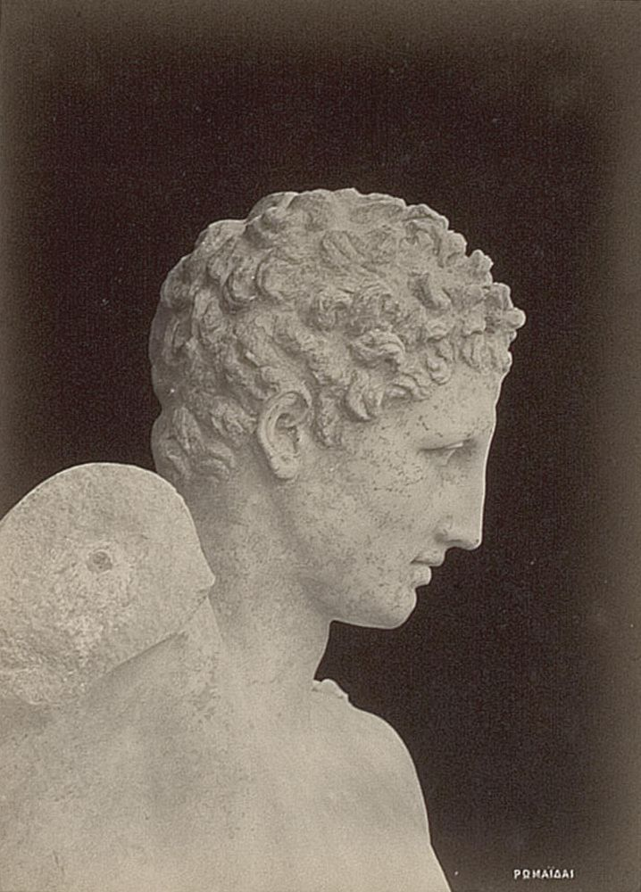 Der Hermes des Praxiteles. Vergl. das Supplementheft zum 2. Bande der „Ausgrabungen“: Hermes mit dem Dionysosknaben, ein Originalwerk des Praxiteles, gefunden im Heraion zu Olympia, herausg. von Georg Treu (Berlin, Wasmuth, 1878). Indem ich für das Nähere auf die vorstehend angeführte Schrift verweise und mir ein Eingehen auf die von Benndorf in einer Anzeige derselben (Kunstchronik 1878 S. 777ff.) aufgeworfenen Fragen vorbehalte, trage ich hier nur einiges Thatsächliche nach. Der Marmor ist, nach dem Zeugniss eines zuverlässigen und kundigen athenischen Marmorarbeiters, parisch. Ferner ist mir erst nach der Ankunft der Abgüsse in Berlin das Fragment des rechten Fusses aufgefallen, welcher nach Arbeit und Grösse dem Hermes anzugehören scheint und ebenso wie der Dionysosrumpf im Gymnasium aufgelesen worden ist. Dies Fragment würde beweisen, dass der Gott ohne Fussflügel und Sandalen gebildet war. Endlich haben Bildhauer darauf aufmerksam gemacht, dass der Rücken der Figur theilweise schon vollendet gewesen sein muss, als der Künstler damit begann, ihn nochmals mit dem Meissel zu übergehen, offenbar weil ihm die Rückenmuskeln noch zu stark erschienen. In dieser Arbeit scheint er unterbrochen worden zu sein. Die Künstler sehen zugleich in der stehen gebliebenen Meisselstrichen den Beweis dafür, dass Praxiteles sich derselben Instrumente bedient hat, welche auch heute noch bei der Marmorarbeit in Gebrauch sind.